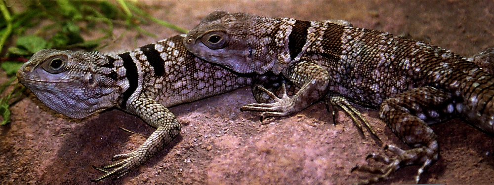 Leguán madagaskarský